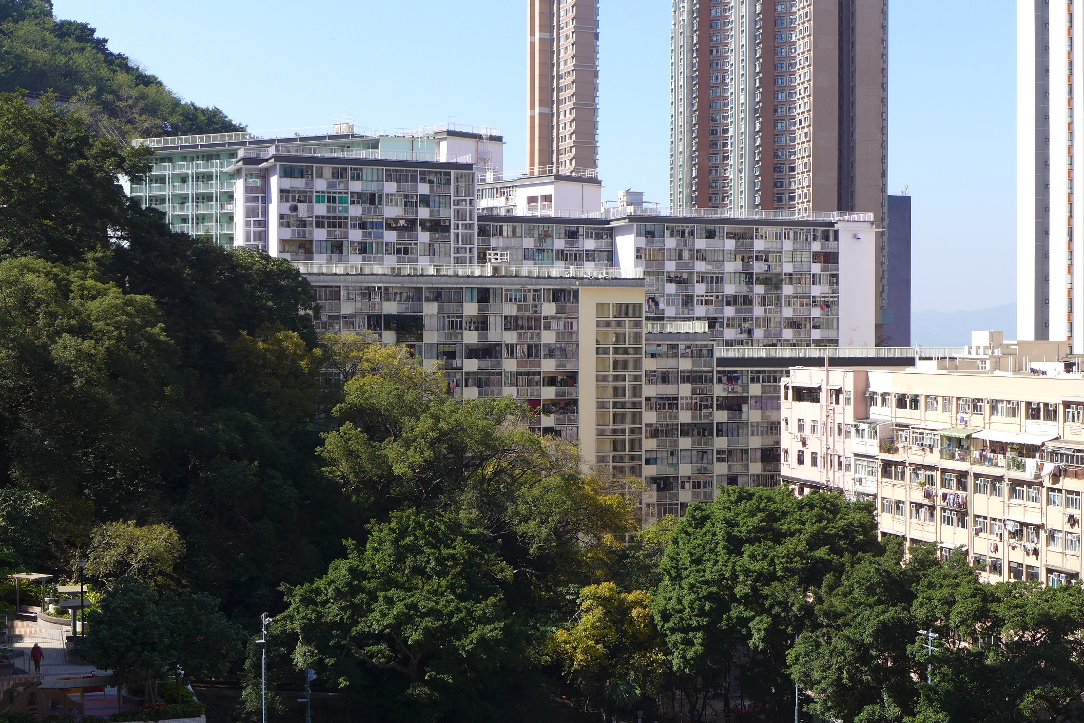 Sai Wan Estate